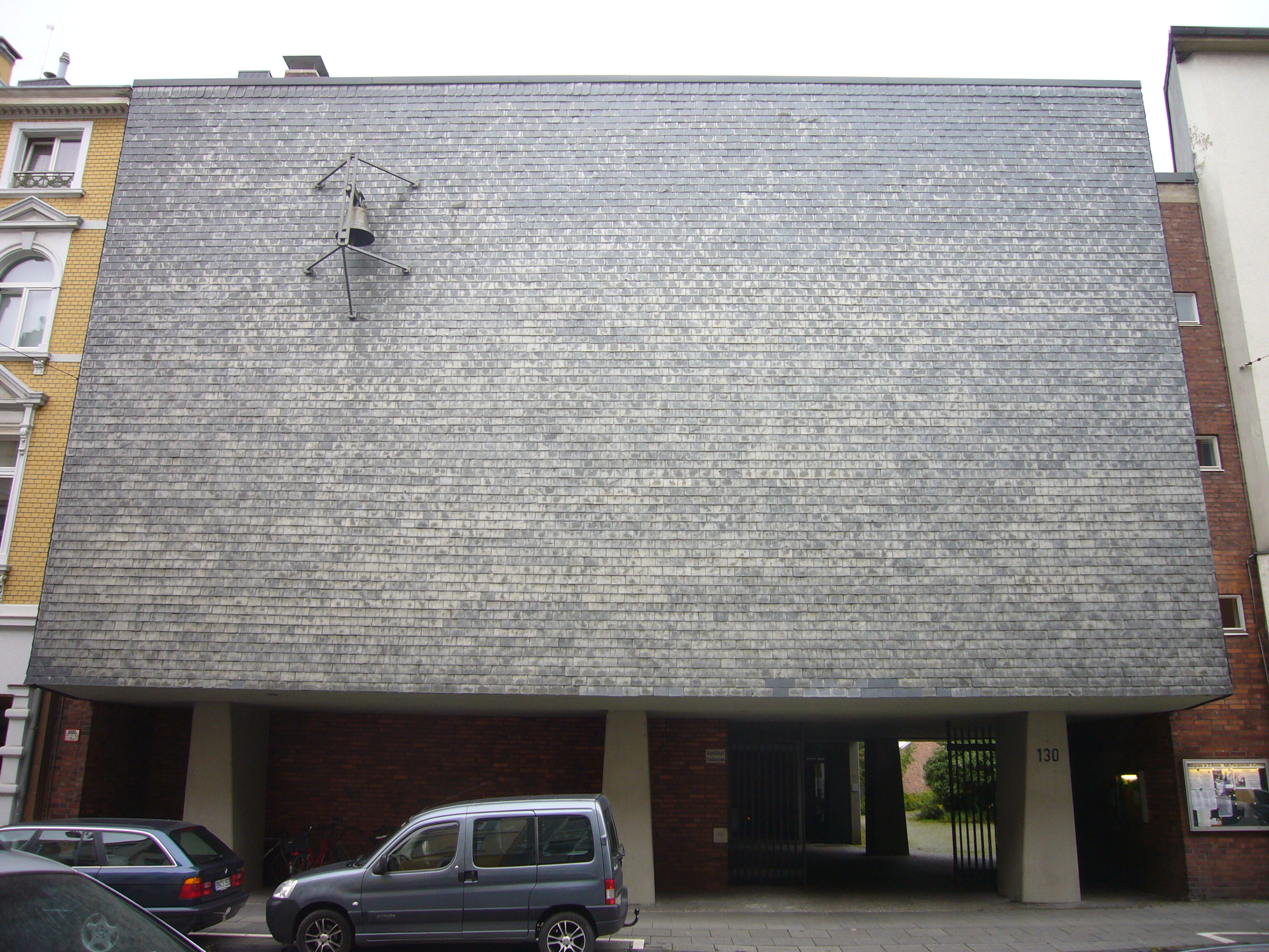 Katholische Pfarrkirche St. Helena in Bonn, Ortsteil Nordstadt